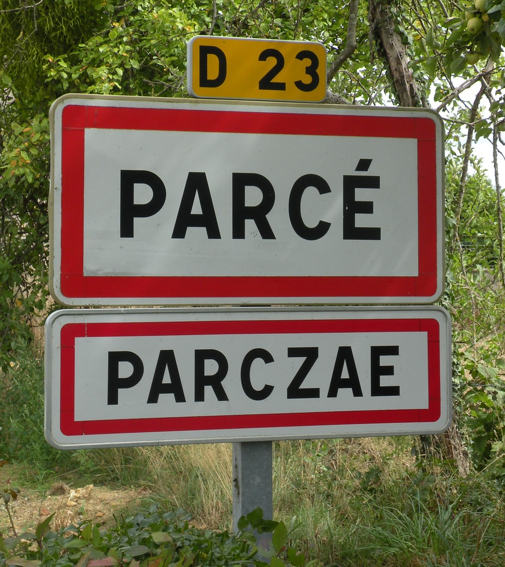 Panneau d'entrée bilingue Français-gallo dans le bourg de Parcé sur la route départementale 23.